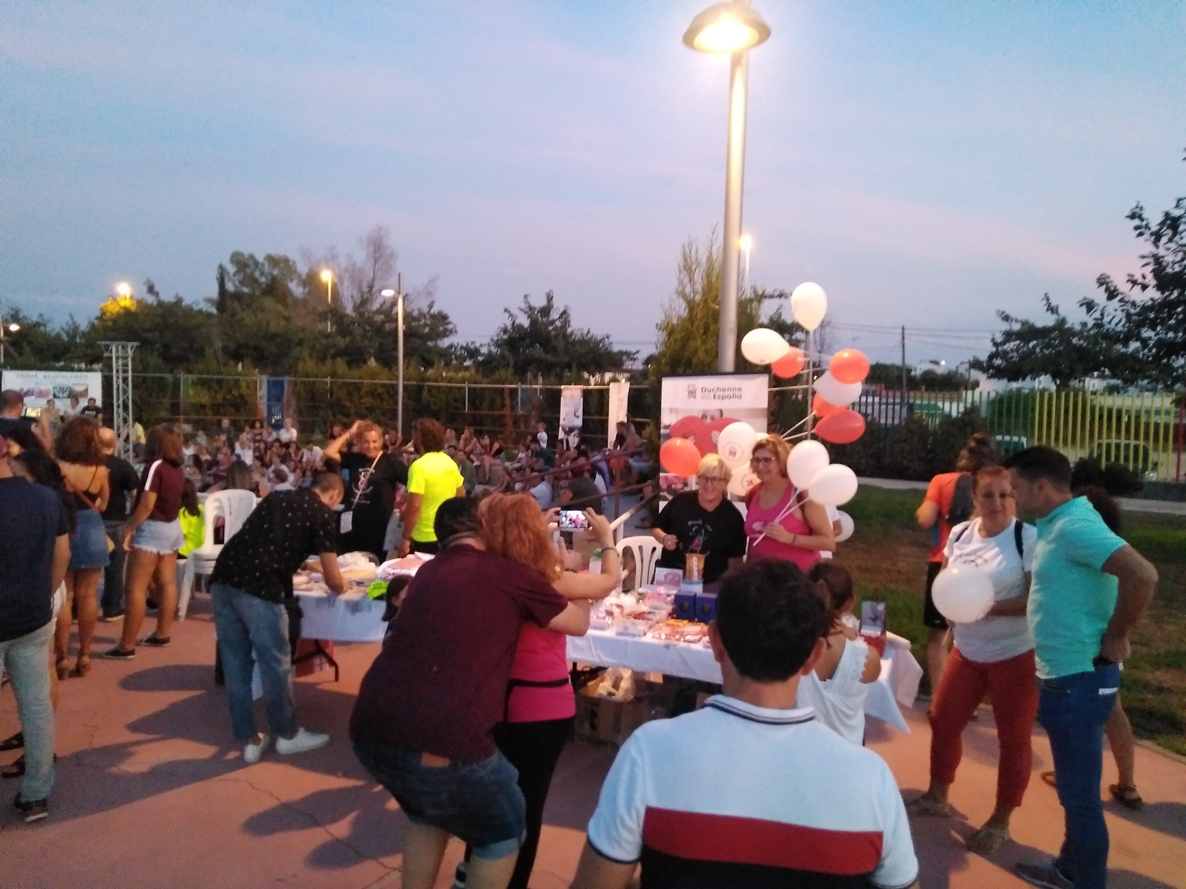 Campaña de Duchenne Parent Project España en la Ciudad de los Niños de Jerez de la Frontera (España) con motivo del Día Internacional de Concienciación con la Distrofia Muscular de Duchenne y la Distrofia Muscular de Becker